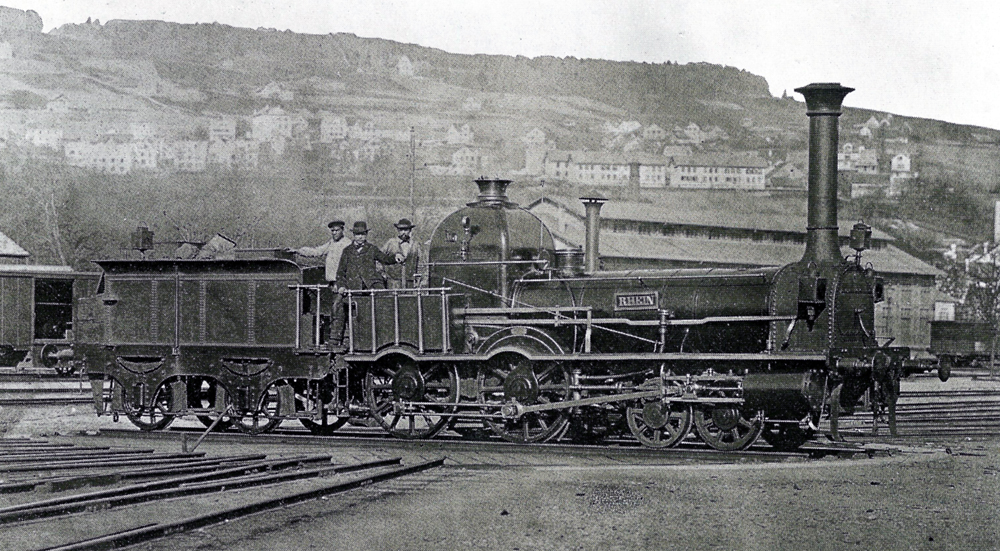 Dampflokomotive Rhein der Schweizerische Nordostbahn ihm Hauptbahnhof Zürich. Die Lokomotive stammte von der Schweizerischen Nordbahn (Spitznamen: Spanisch-Brötli-Bahn), die am 1. Juli 1853 von der Schweizerische Nordostbahn übernommen wurde.